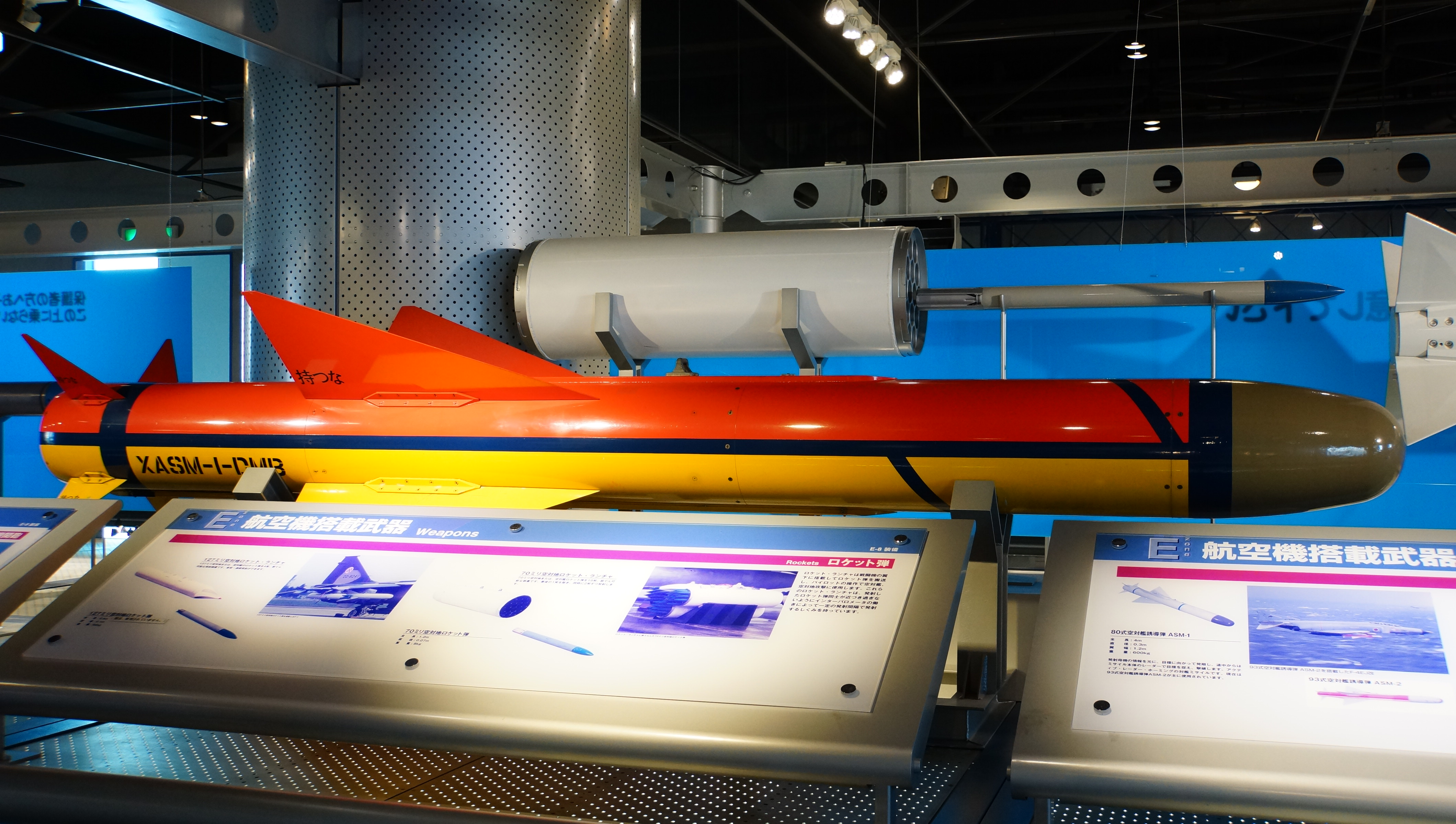 航空自衛隊 80式空対艦誘導弾（試験弾）。 14年11月24日 浜松基地広報館内にて。